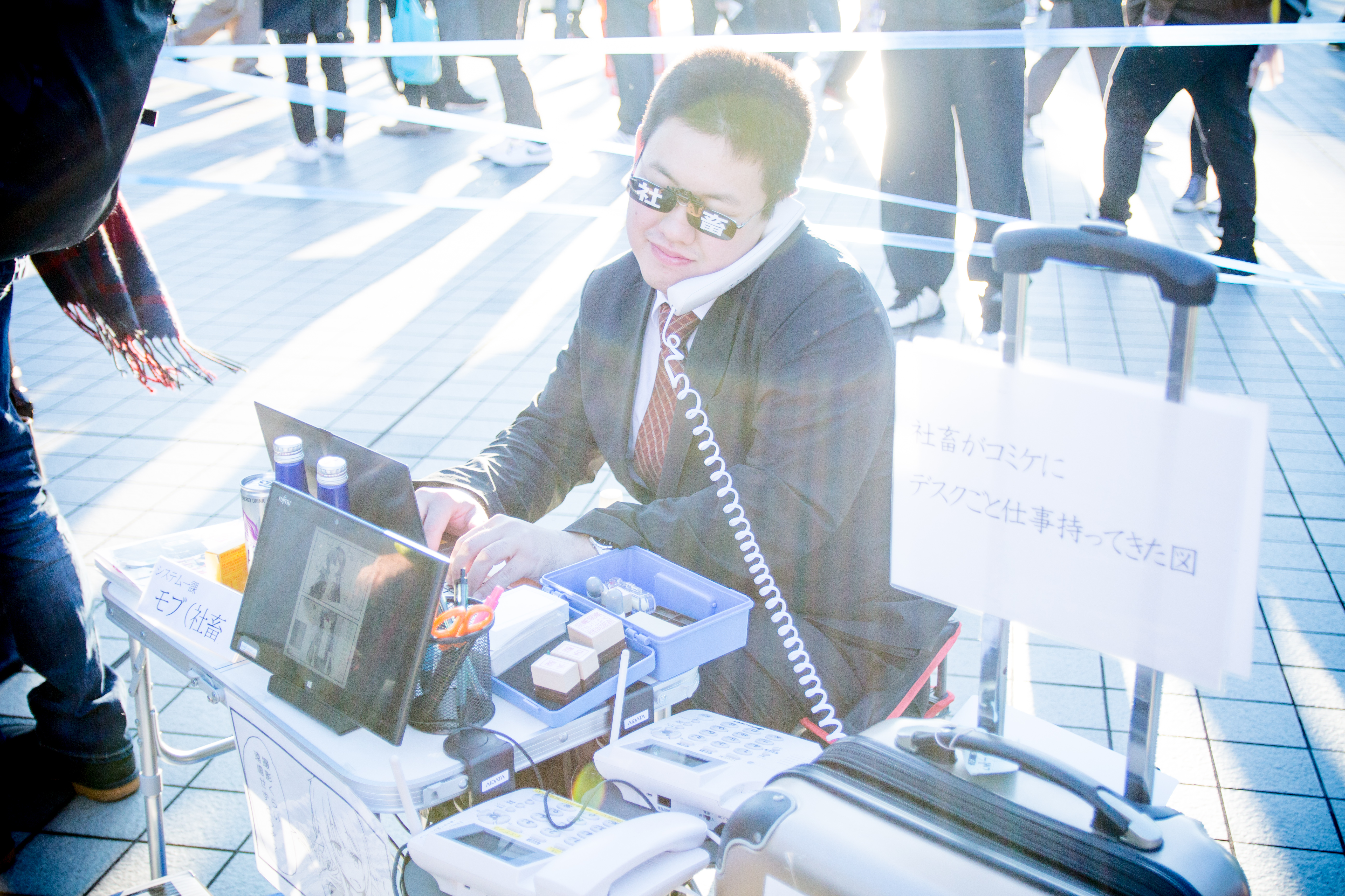 コミックマーケット91 2日目 コスプレイヤー